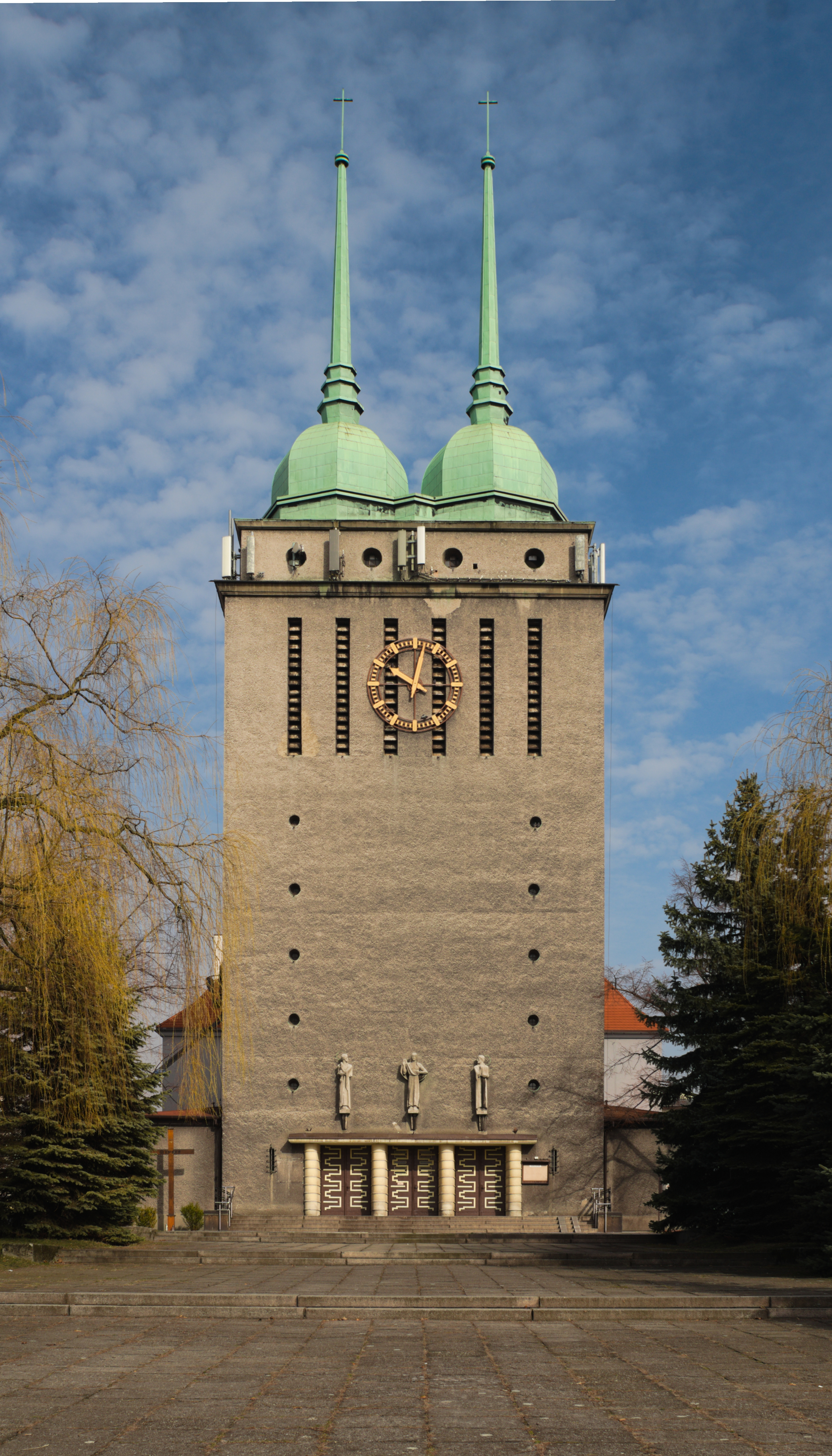 fasada kościoła Najświętszej Maryi Panny Wspomożenia Wiernych w Gliwicach-Sośnicy